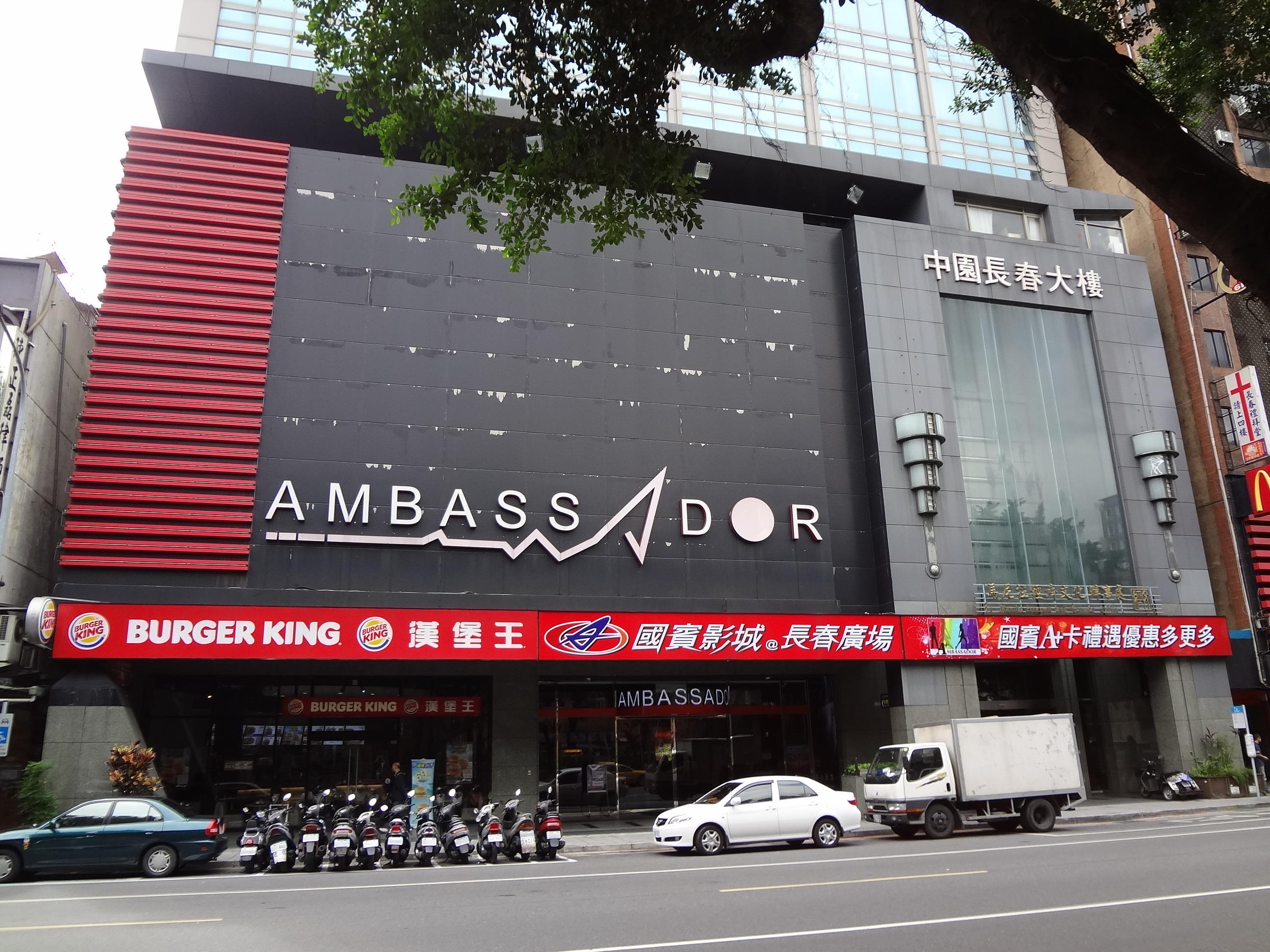 中文（台灣）: 國賓影城@台北長春廣場，地址：臺北市中山區長春路176號（中園長春大樓）。